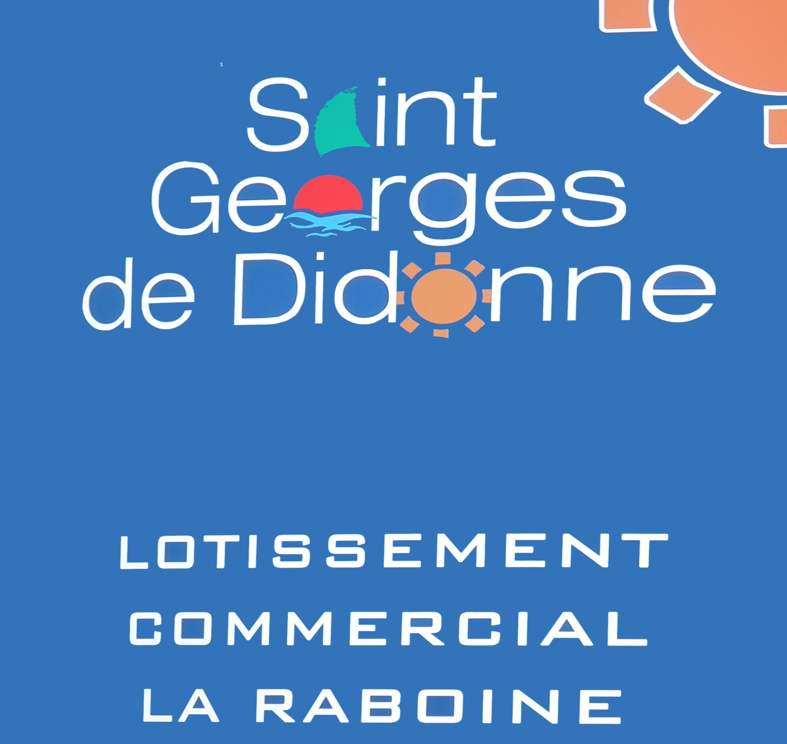 Panneau du lotissement La Raboine